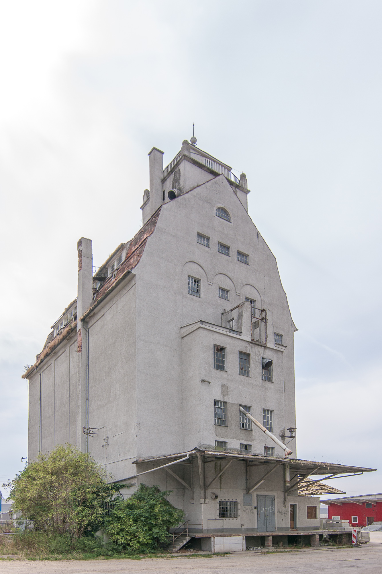 Getreidesilo, mehrgeschossiger Eisenbetonbau mit mehrfach abgesetztem Dach und bekrönendem Türmchen, 1919/20.This is a photograph of an architectural monument.